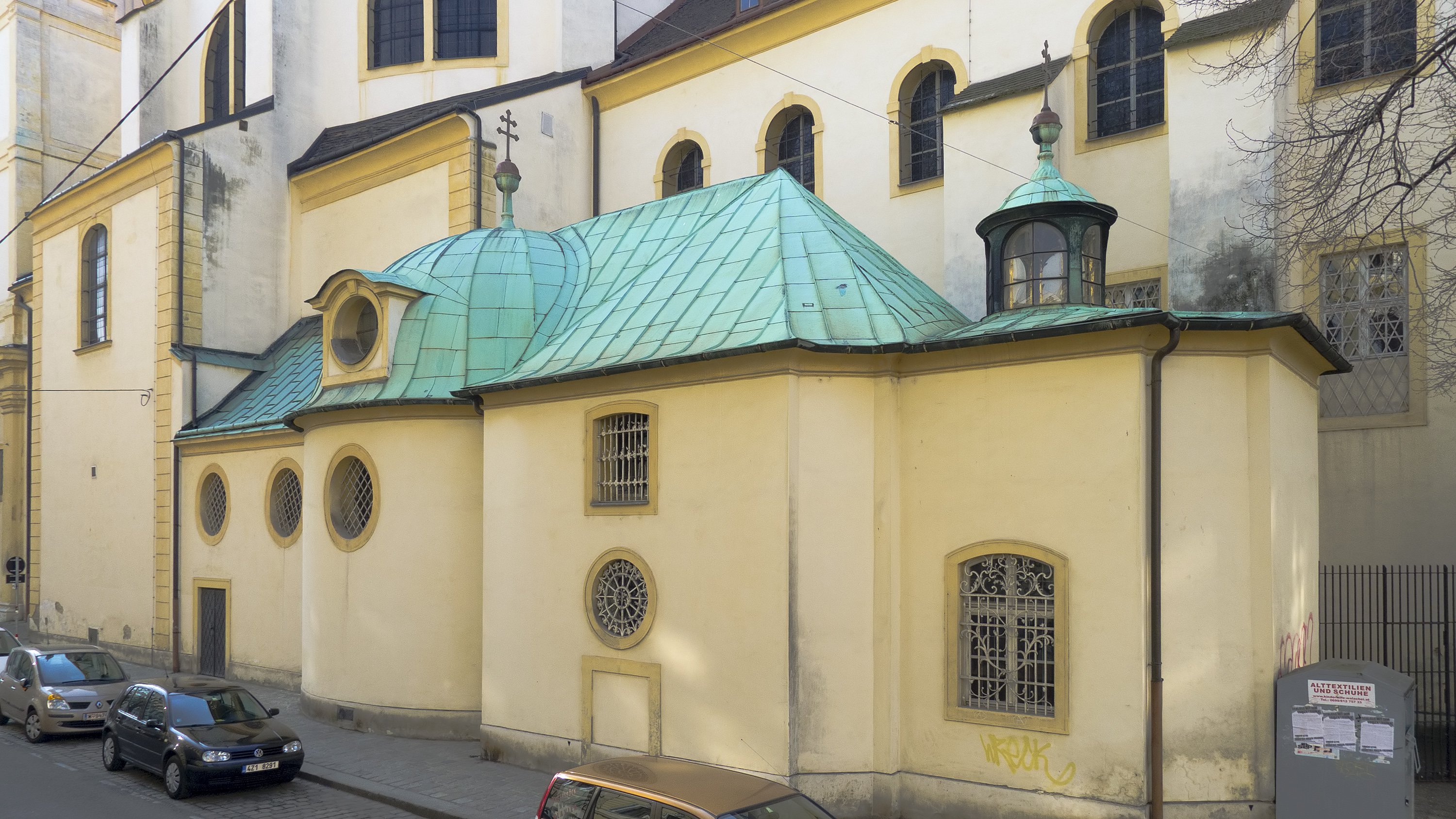 Peregrini-Kapelle der Servitenkirche in Wien 9